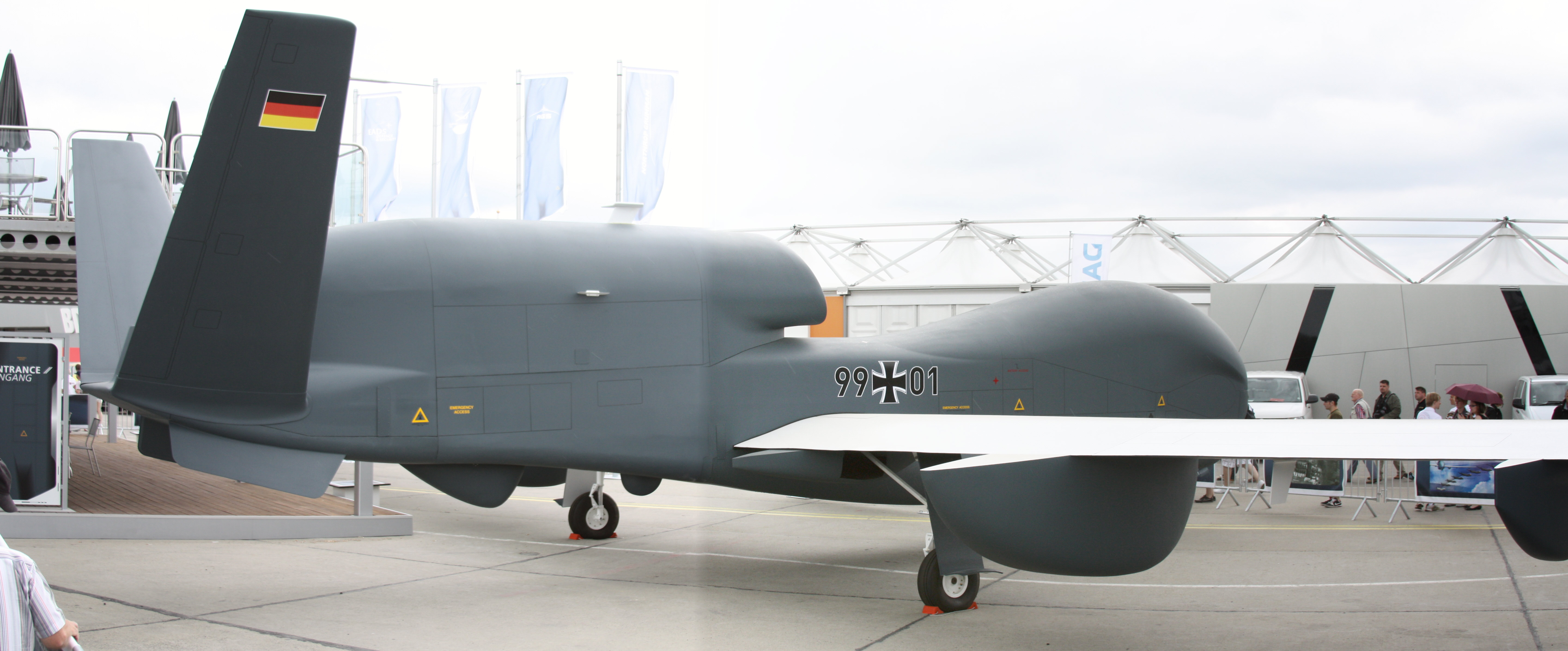 ILA 2010, am Samstag aufgenommen, meist erhöht von einer Leiter fotografiert